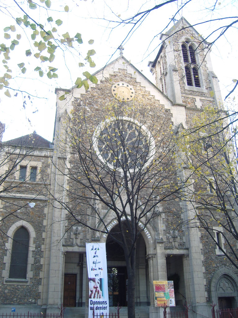 Paris 13e, église Saint-Hippolyte, avenue de Choisy